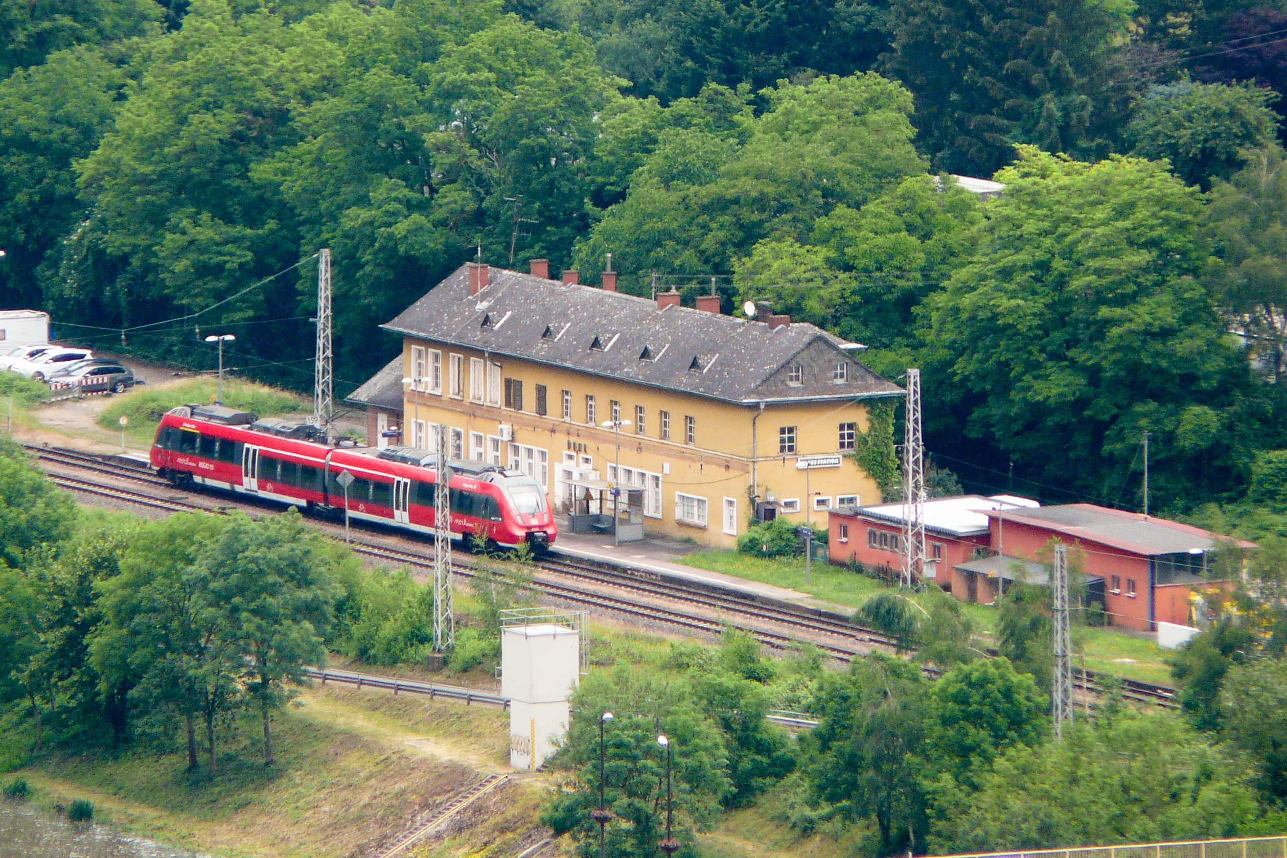 Der Bahnhof von Perl im Saarland. Blick vom anderen Moselufer, Standpunkt weit oberhalb von Schengen. Im Bahnhof steht ein Elektrotriebwagen der Baureihe 442.0 ("Talent 2") von DB Regio, der auf der Obermoselstrecke zwischen Trier Hbf und Perl verkehrt.